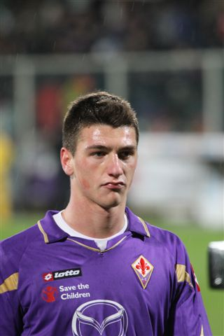 Michele Camporese (Pisa, 19 maggio 1992) è un calciatore italiano, difensore della Fiorentina e della Nazionale italiana Under-21.